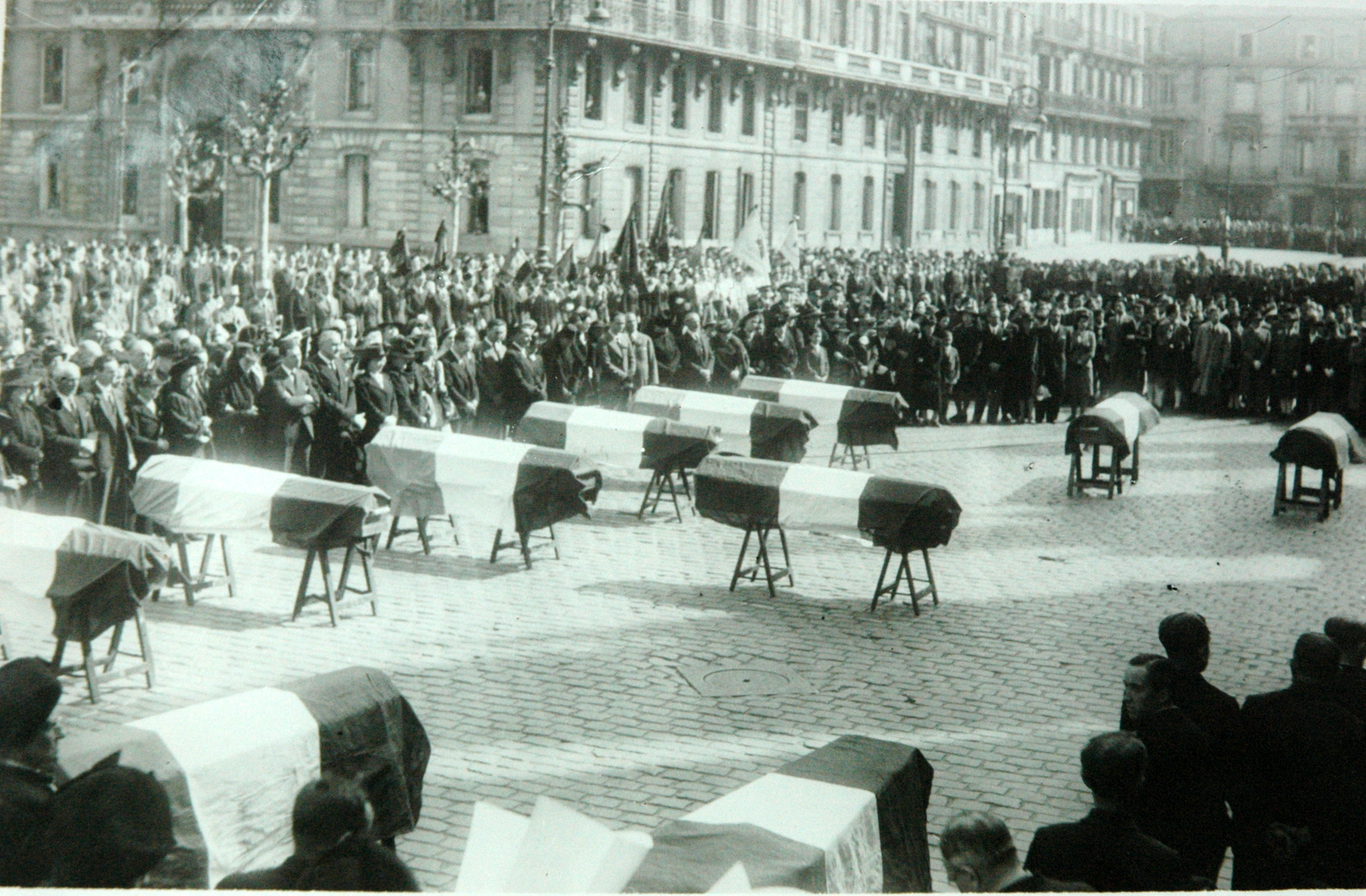 Bordeaux 21-04-1945 Parvis cathédrale Saint-André